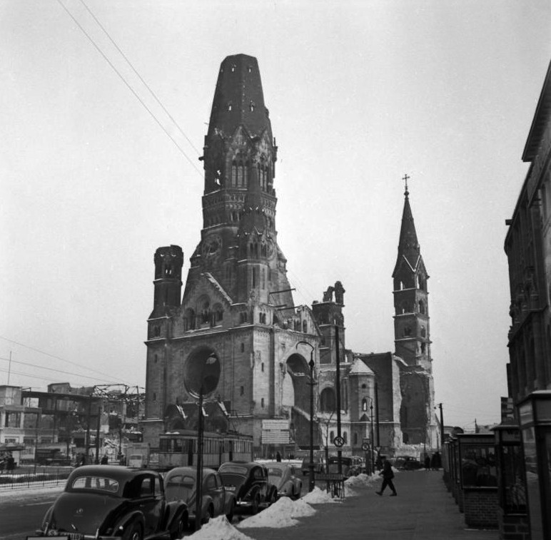 Stadtaufnahmen Berlin. Kaiser Wilhelm Gedächtniskirche Information added by Wikimedia users.